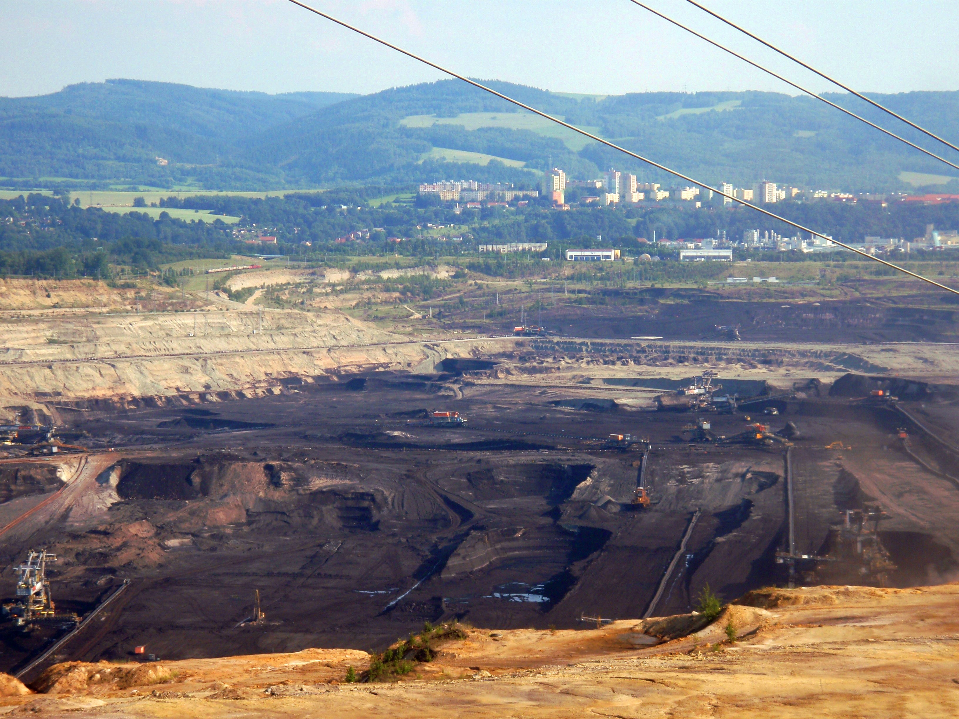 Lom Jiří (v pozadí Sokolov)